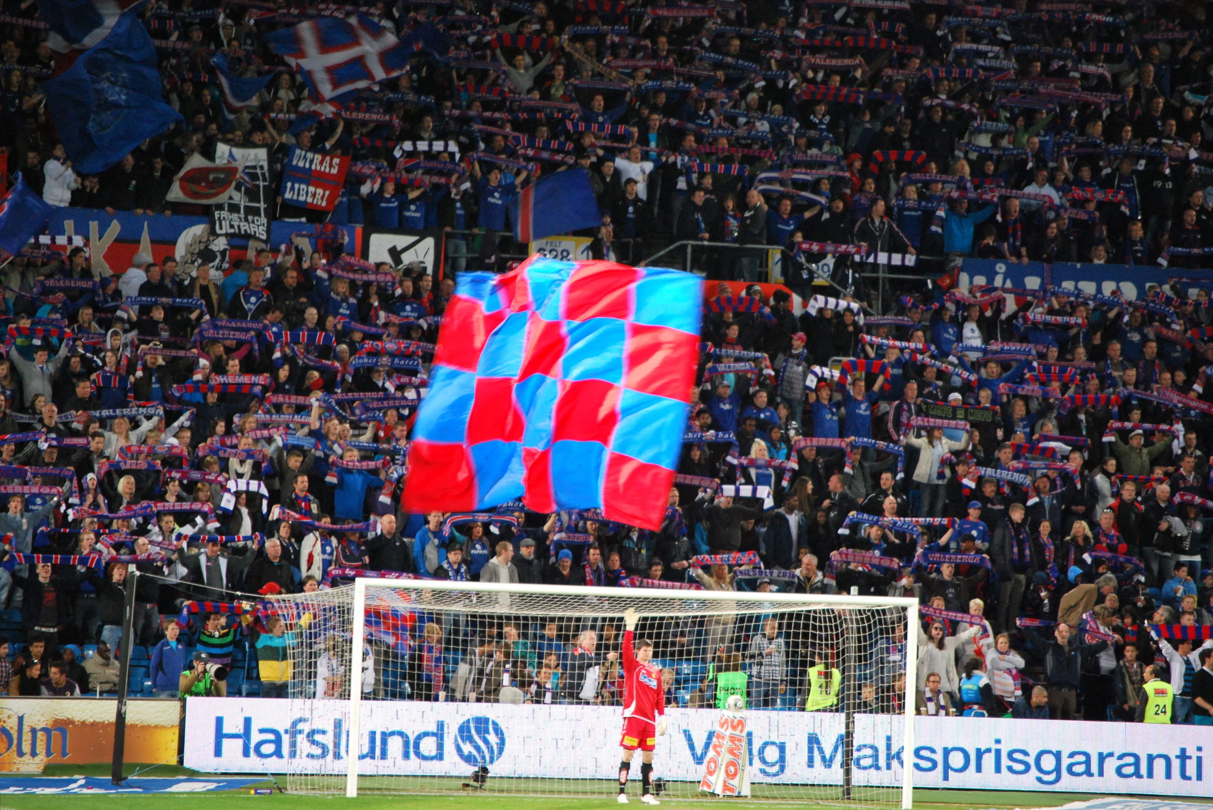 Vålerenga IF supporters during Vålerenga - Lillestrøm SK match (1:1), 17. april 2011